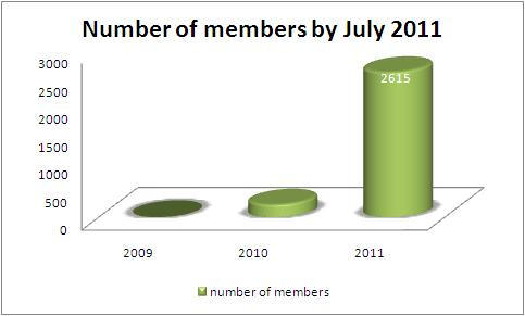 nombre de membres de la base de donnée du wsis stocktaking